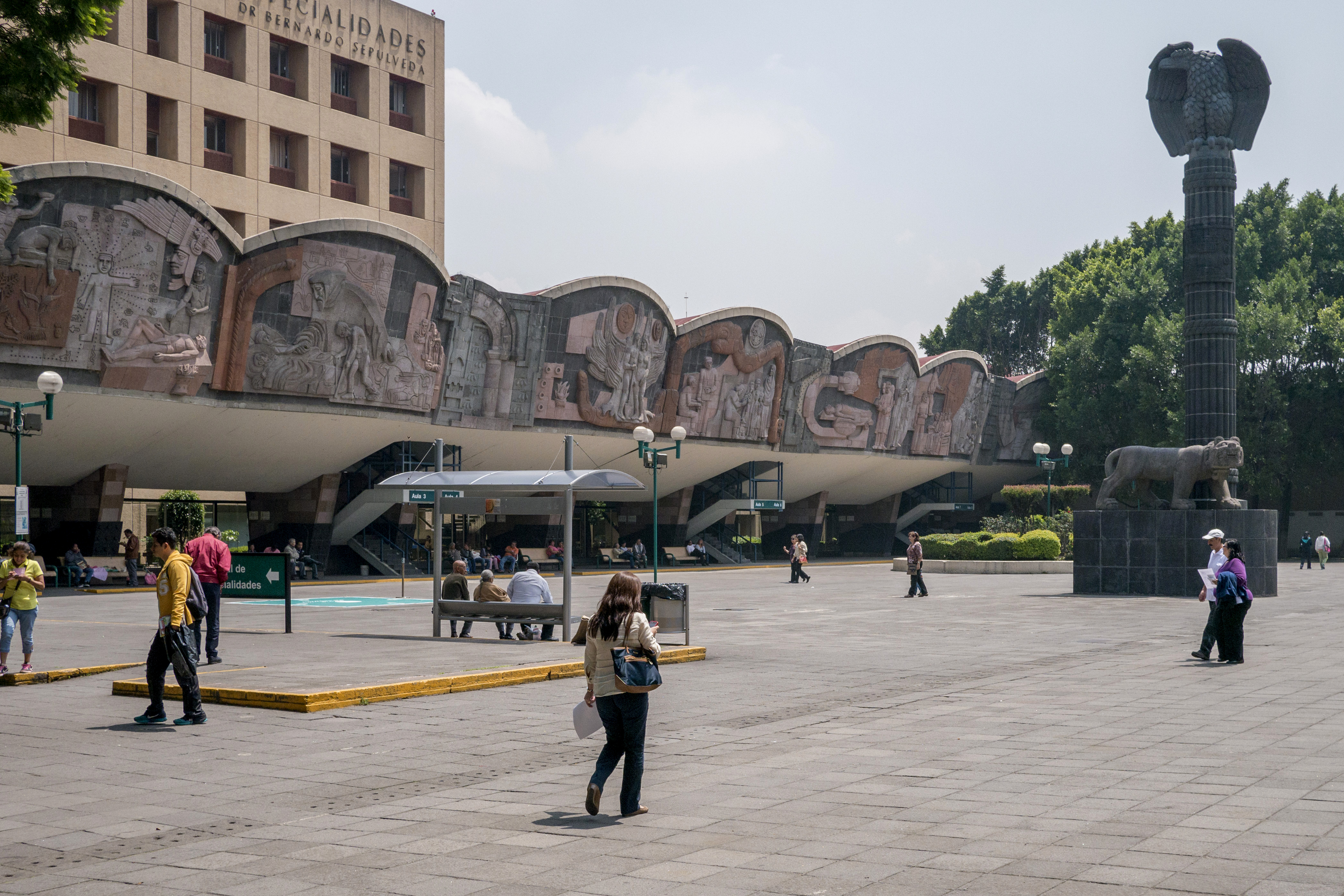 Centro Médico Nacional Siglo XXI